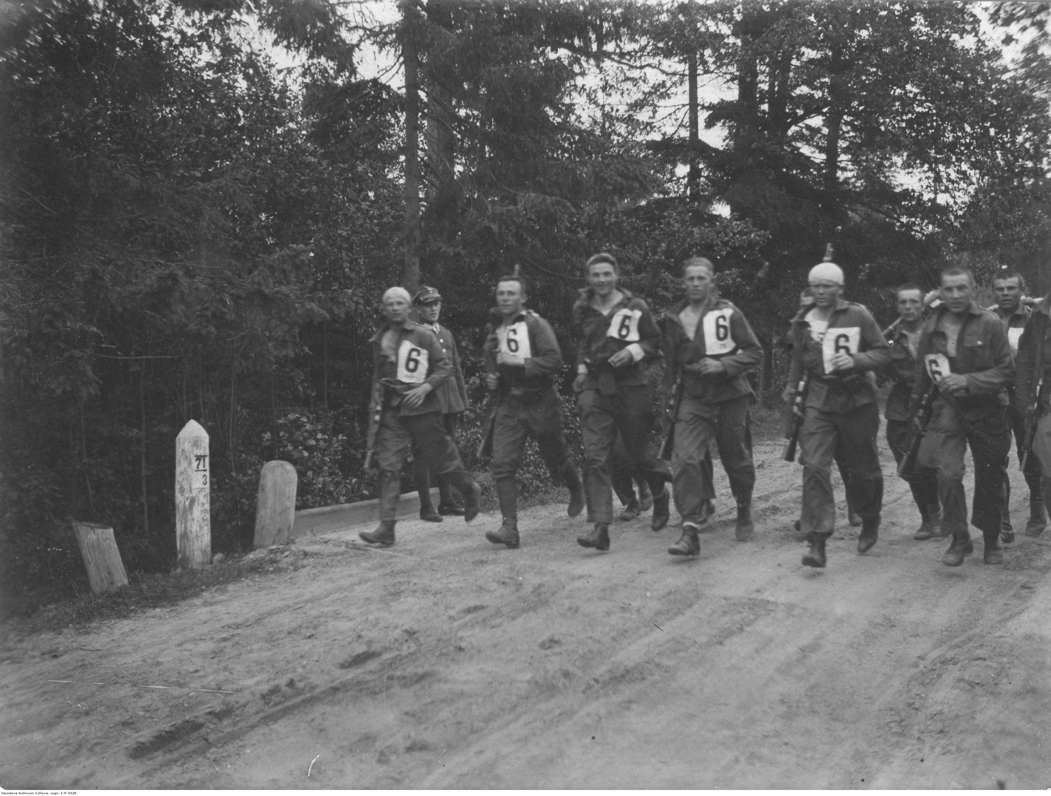 Marsz szlakiem króla Stefana Batorego na trasie Konstantynów-Wilno. Drużyna 5 Pułku Piechoty Legionów na trasie liczącej 86 km (I nagroda). Koncern Ilustrowany Kurier Codzienny - Archiwum Ilustracji. Sygnatura: 1-P-3428